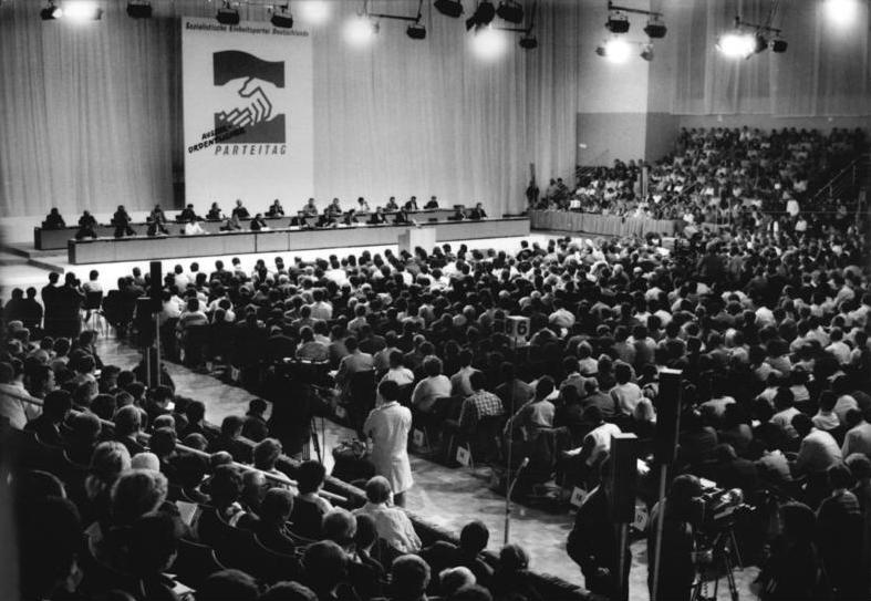 ADN-ZB Mittelstädt 8.12.89 Berlin: Außerordentlicher Parteitag Nach kontroverser Debatte, Vorschlägen und Gegenvorschlägen zu Personen und zum Wahlmodus billigten die Delegierten in der Dynamo-Sporthalle die Zusammensetzung der Redaktionskommission, der Antragskommission und der Wahlkommission des Parteitages der SED.